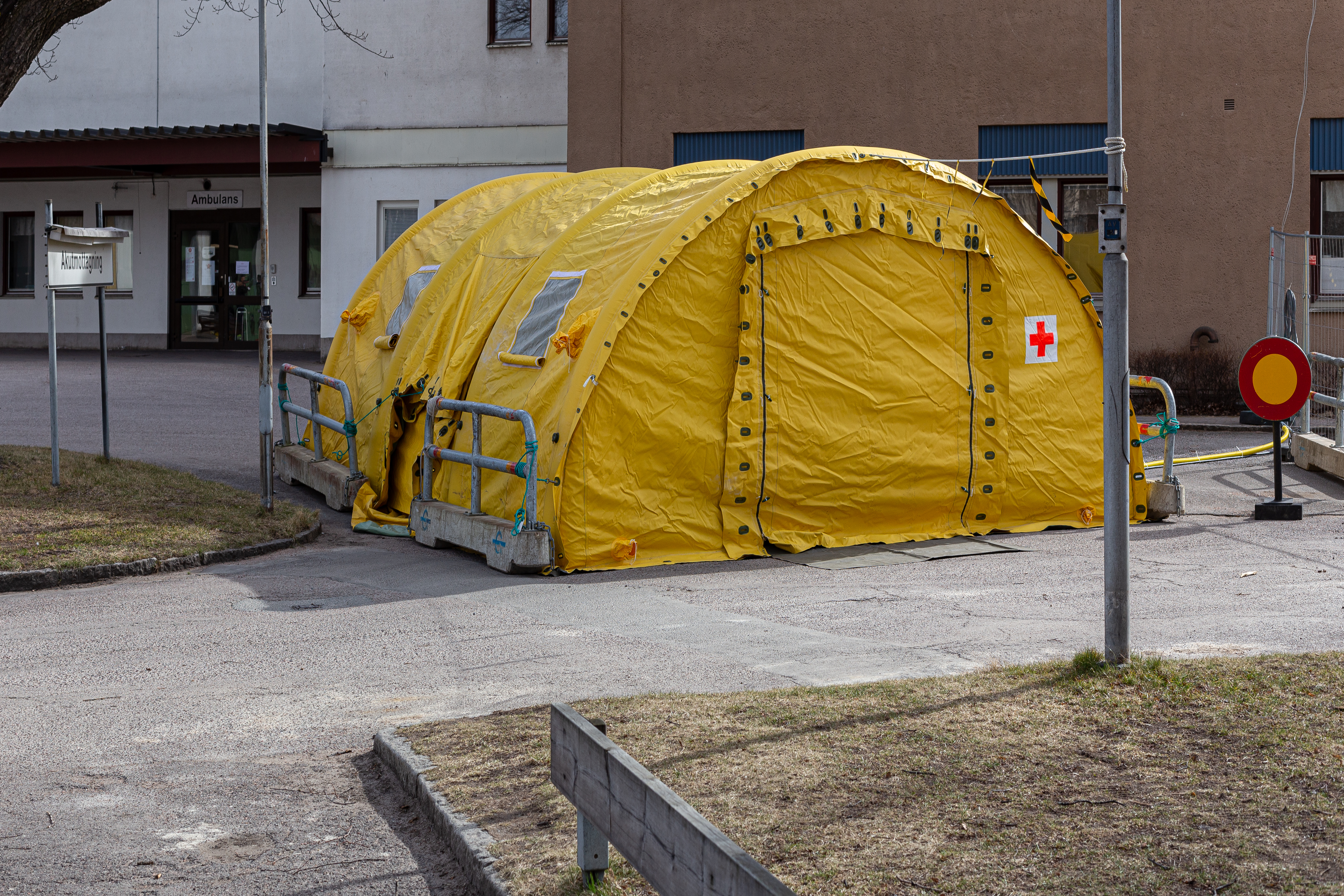 Covid-19-tält utanför Avesta lasarett, taget i bruk 2020-03-27, där alla inkommande patienter tas emot och testas innan de får komma in på akutmottagningen.